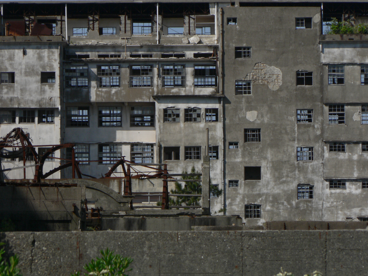 端島小中学校(70号棟、7F)